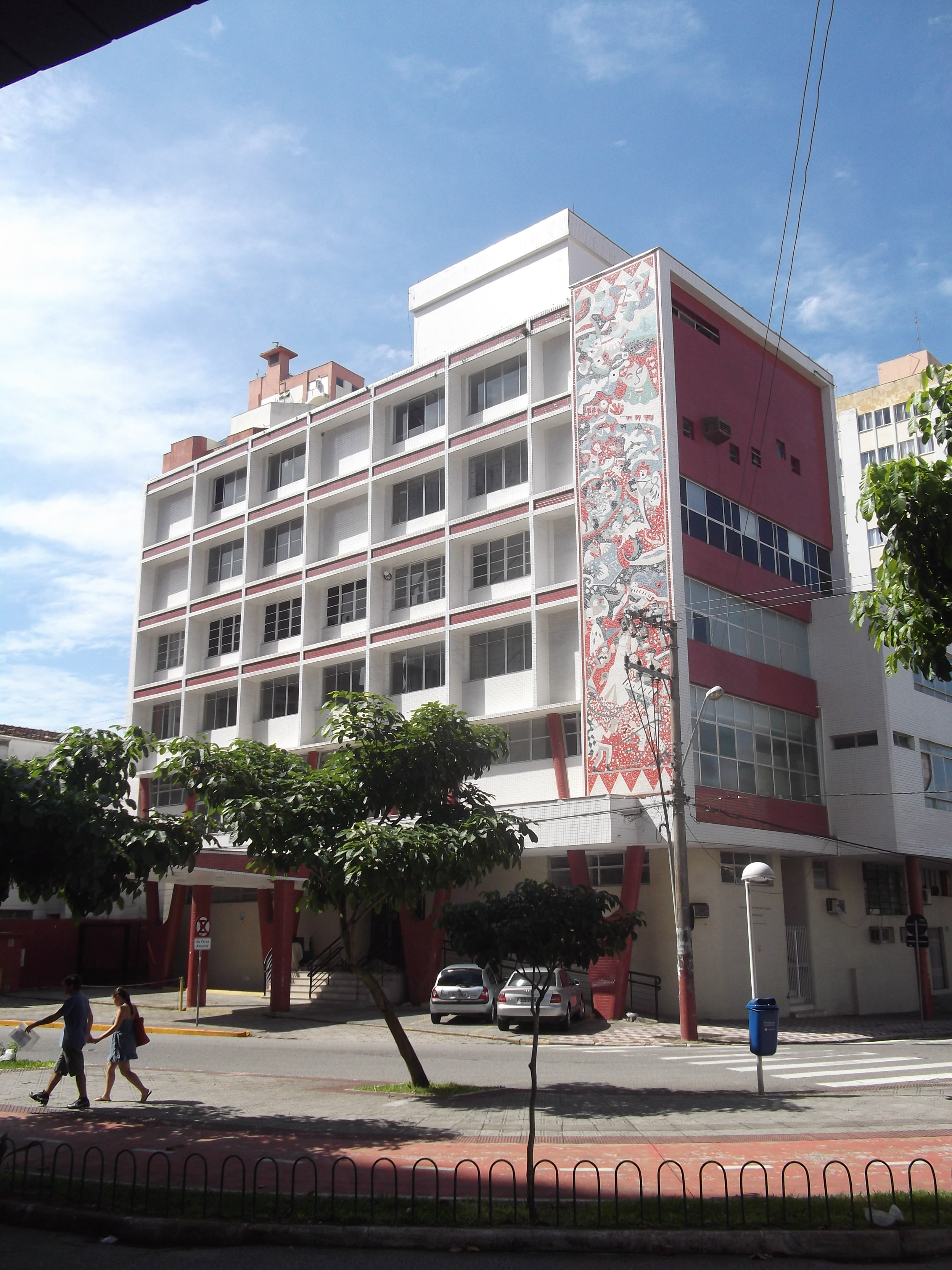 Florianópolis, Brasil 2014-04-19